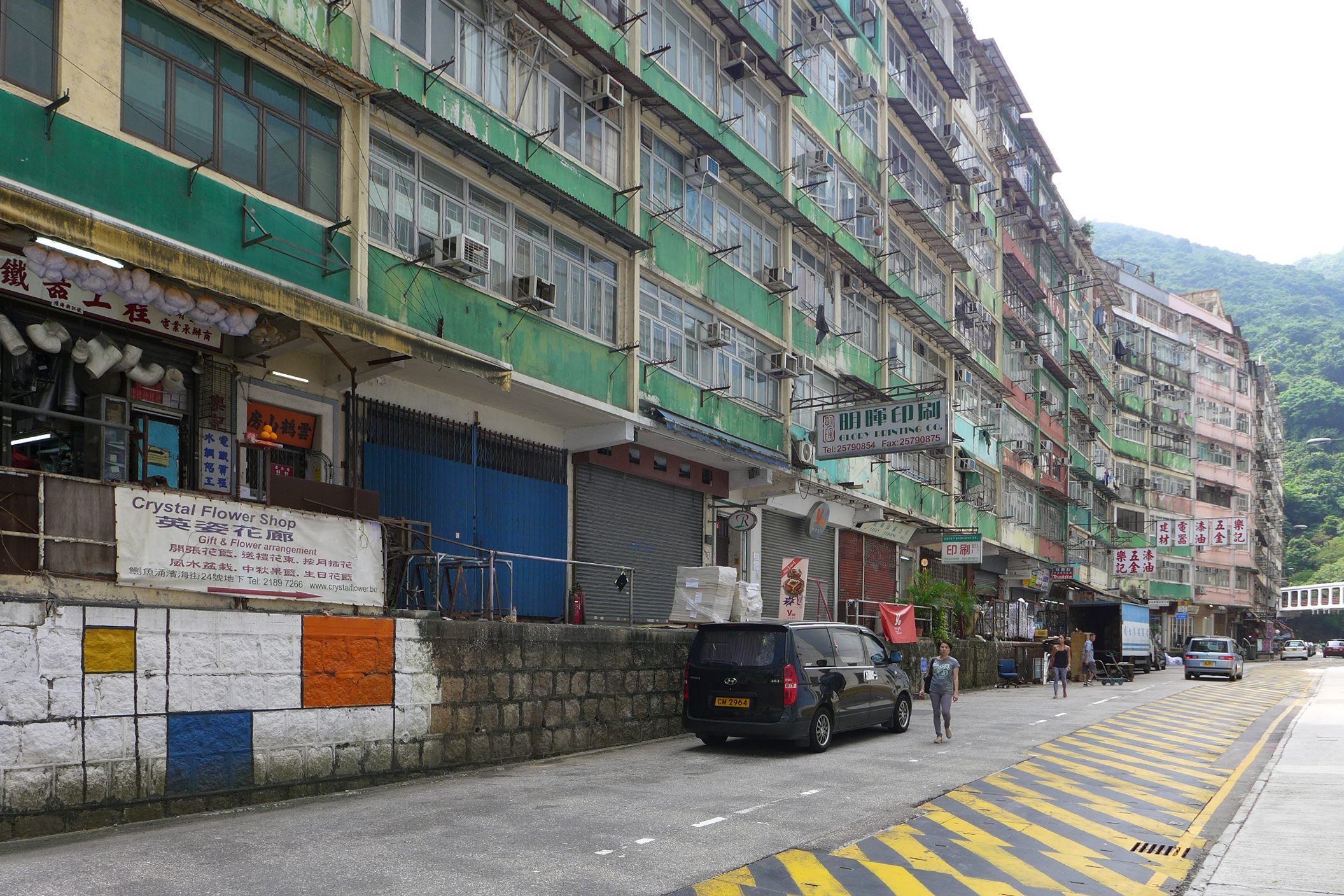 Pan Hoi Street